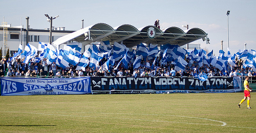 Kibice Stali Rzeszów 2012